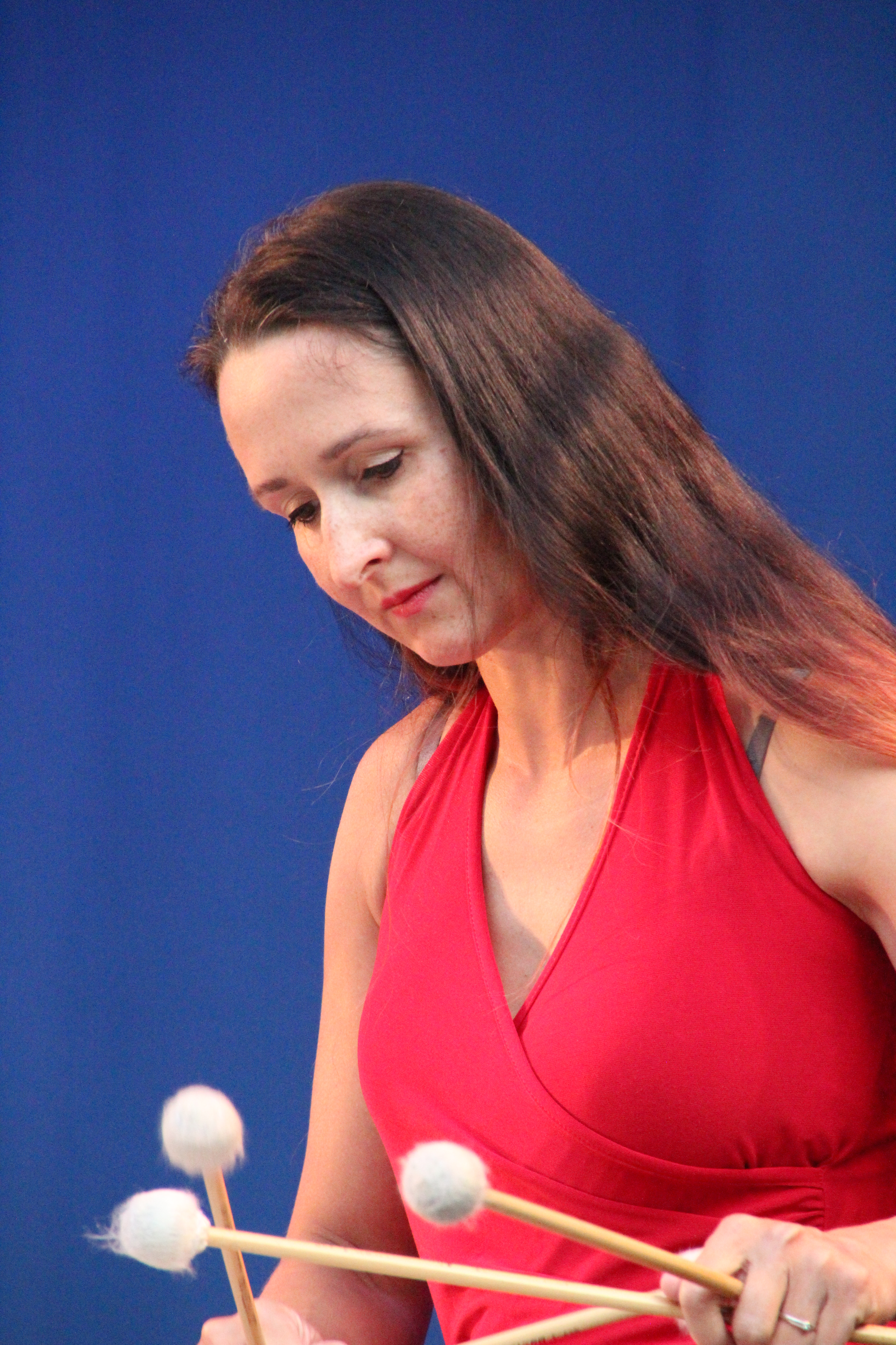 Bildinhalt: Izabella Effenberg bei einem Auftritt mit dem European Blue Note Quartet im Frankfurter Palmengarten Aufnahmeort: Frankfurt am Main, Deutschland Die dargestellte Person wurde bei einem öffentlichen Auftritt fotografiert.